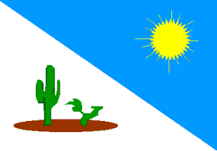 Bandeira do município de Serrita, Pernambuco; Flag of Serrita city, Pernambuco, Brazil